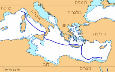 אוניית המעפילים ארבע חירויות - מסלול